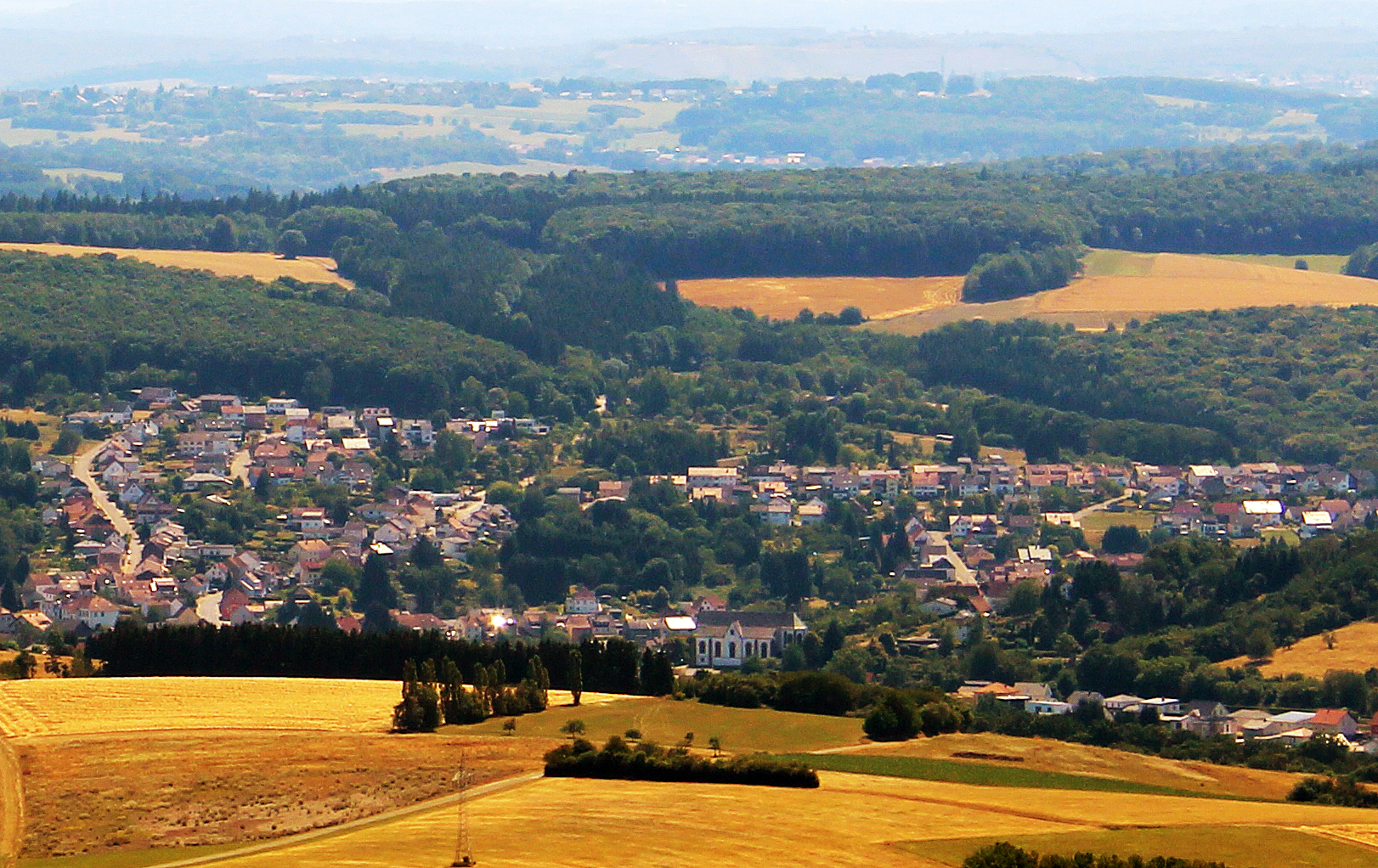 Blick vom Schaumberg auf Marpingen, Landkreis St. Wendel, Saarland